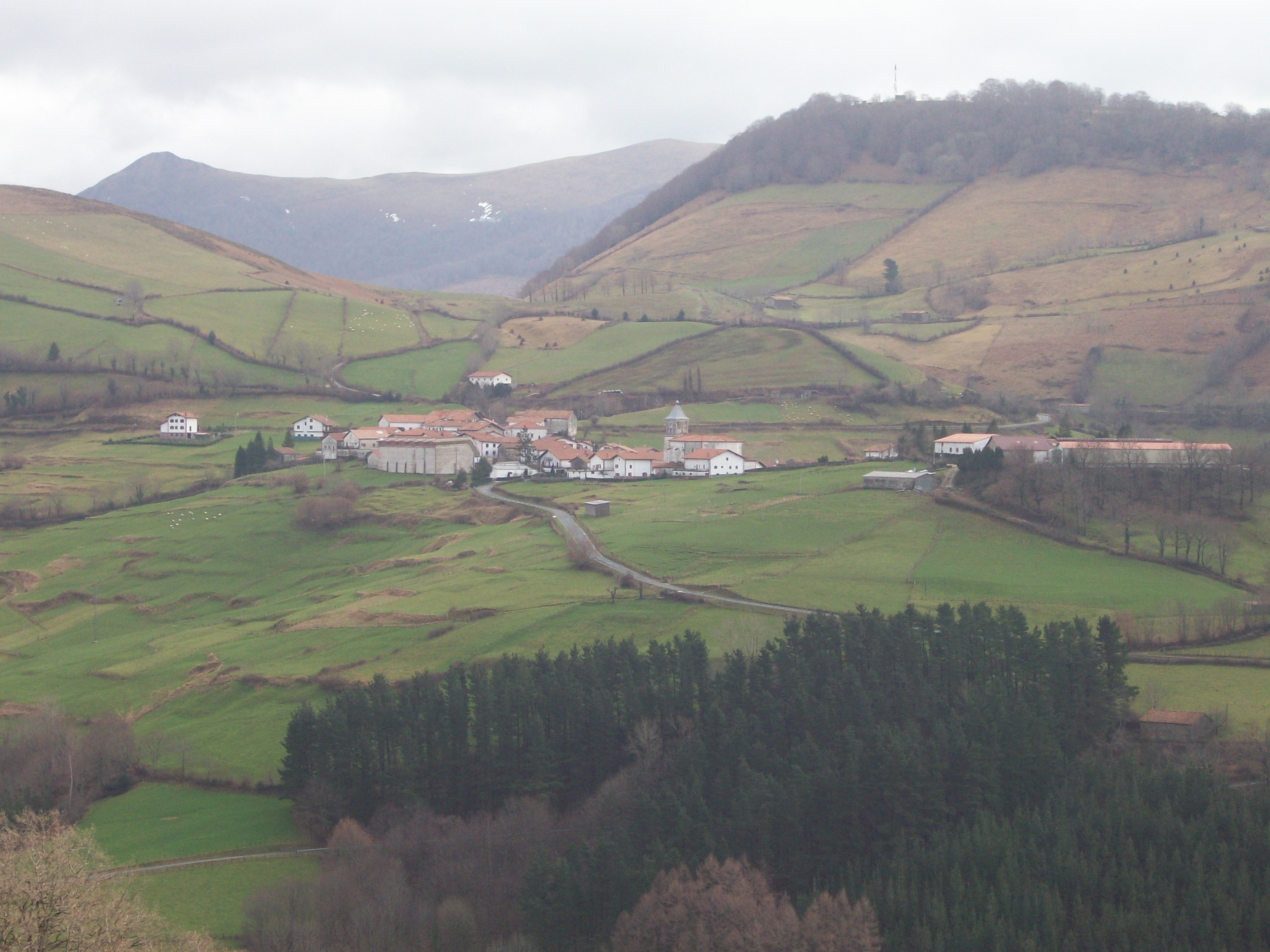 Malerrekako Saldias udalerria. Nafarroa, Euskal Herria.